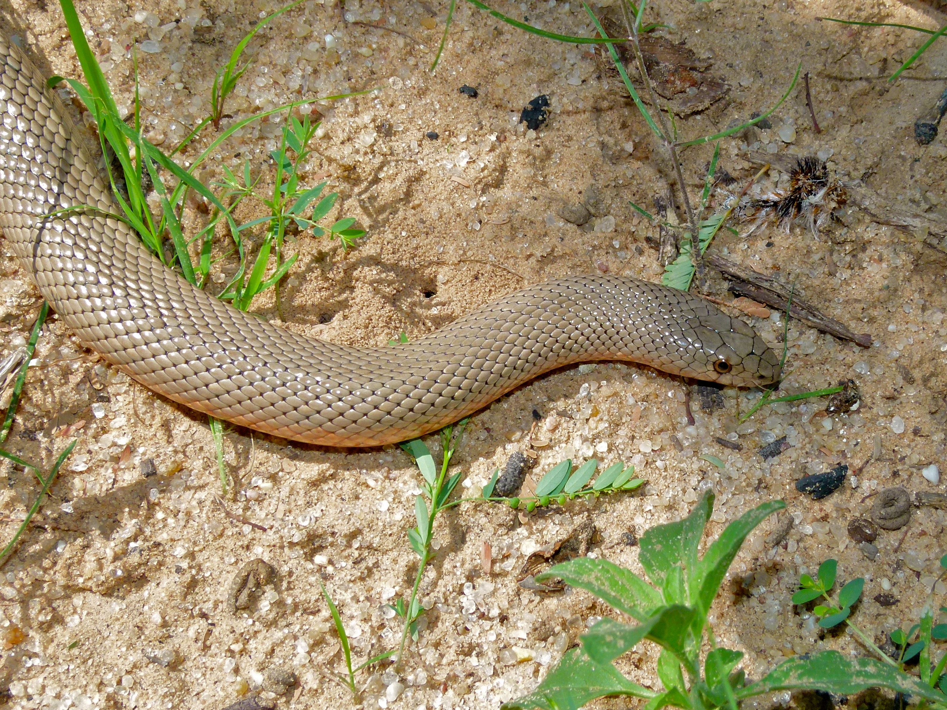 Lijersdraal Picnic Site, Kgalagadi Transfrontier Park, SOUTH AFRICA